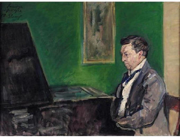 Gemälde "Conrad Ansorge am Klavier".